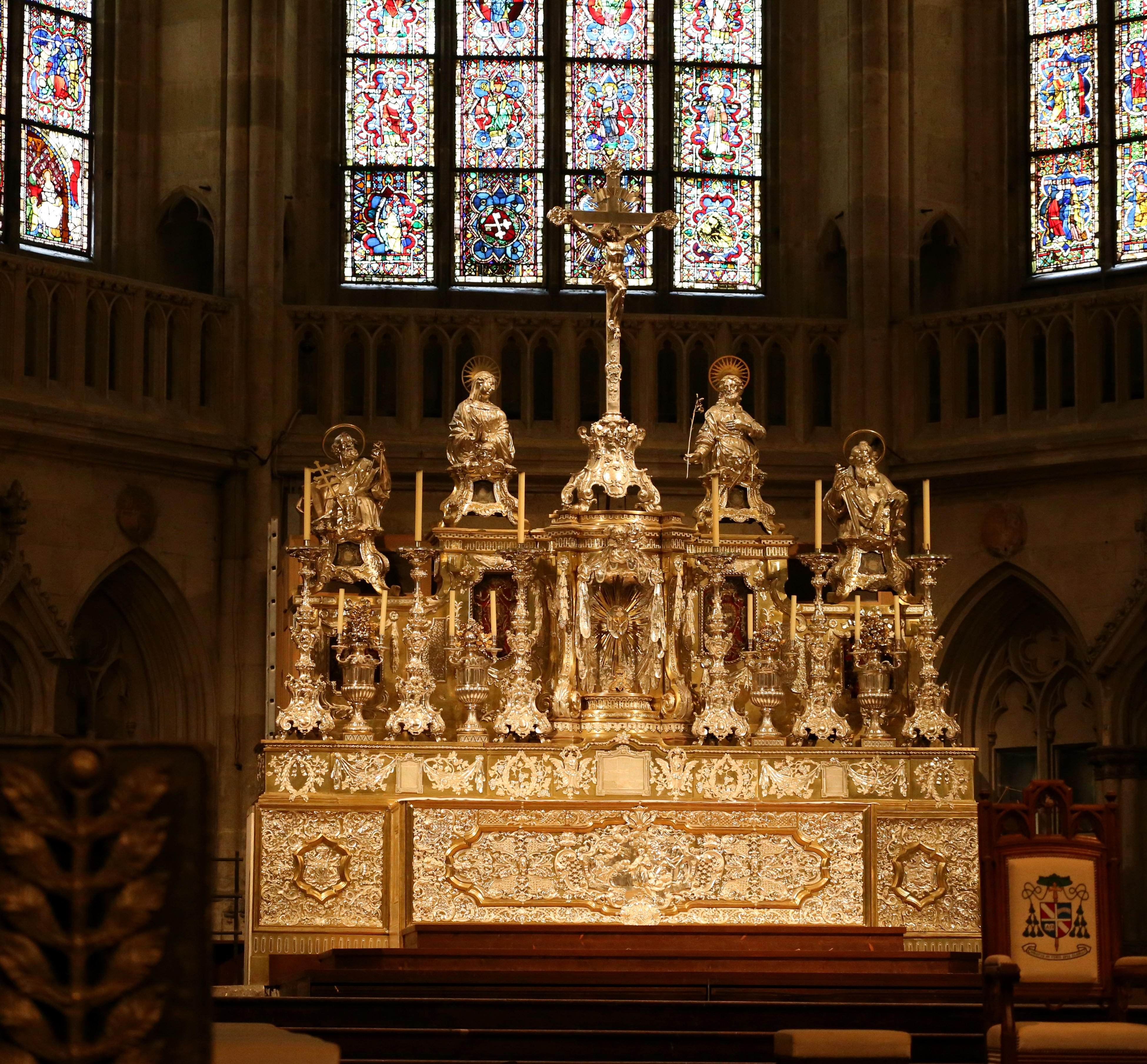 Domkirche St. Peter, dreischiffige Basilika mit drei Polygonalchören, östlichem Querhaus und Doppelturmfassade, durchgehender Hausteinbau, nach 1273 begonnen, bis um 1520 weitgehend fertiggestellt, im 15. Jahrhundert unter den Werkmeistern der Familie Roritzer, Ausbau der Türme 1859–69 durch Dombaumeister Franz Joseph von Denzinger; mit Ausstattung